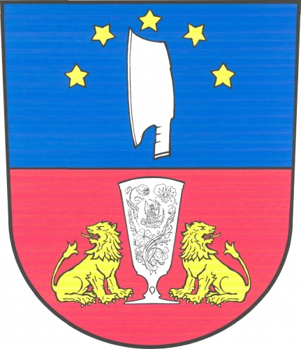 znak, Sklené, okres Žďár nad Sázavou